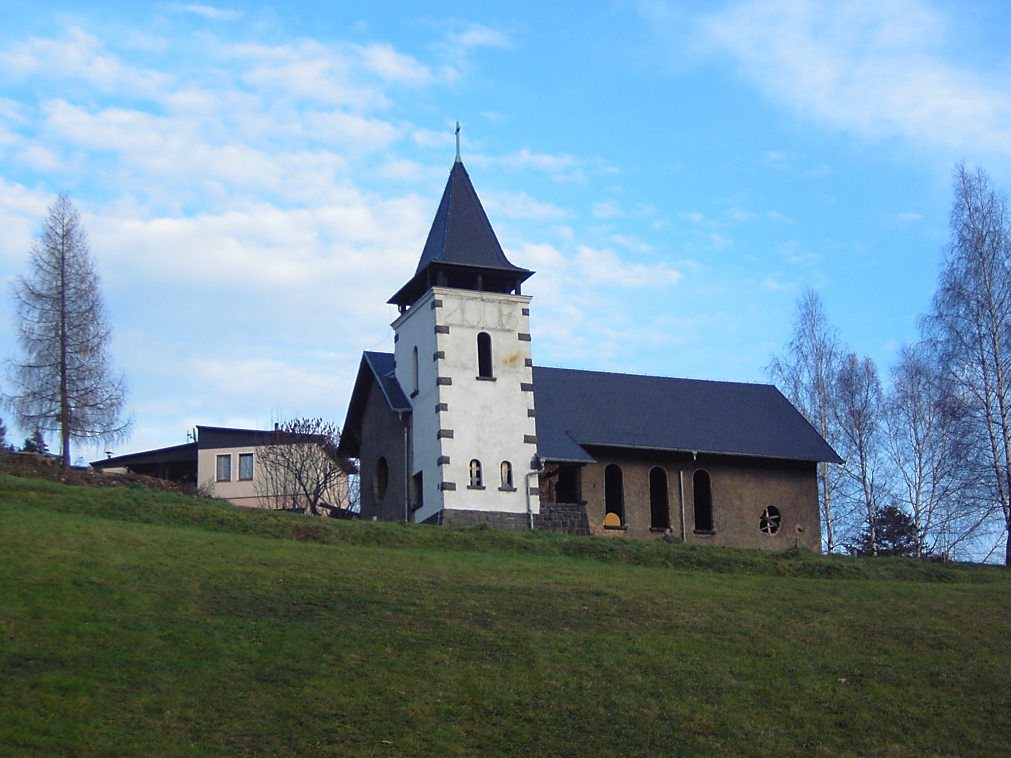 Evangelický kostel (Centrum setkávání) v Dolní Poustevně